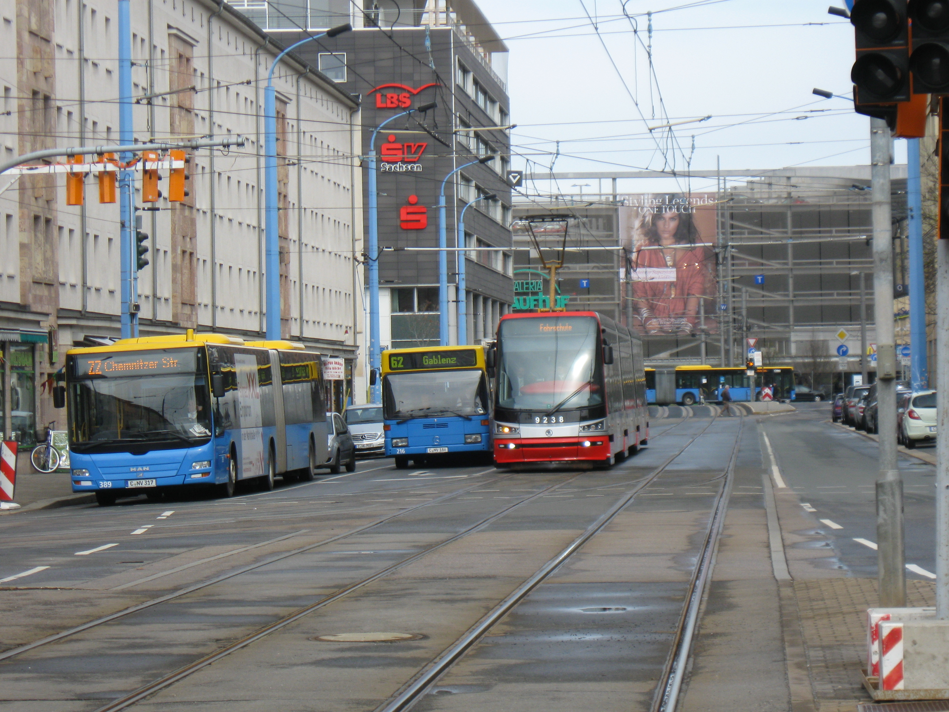 Škoda-Teststraßenbahn in Chemnitz vor der Haltestelle Annenstraße in der Reitbahnstraße